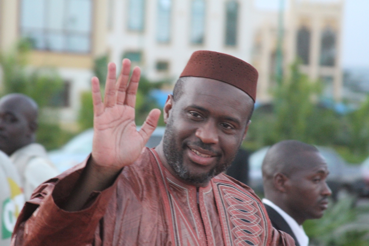 Moussa Mara, premier ministre du Mali en juillet 2014.